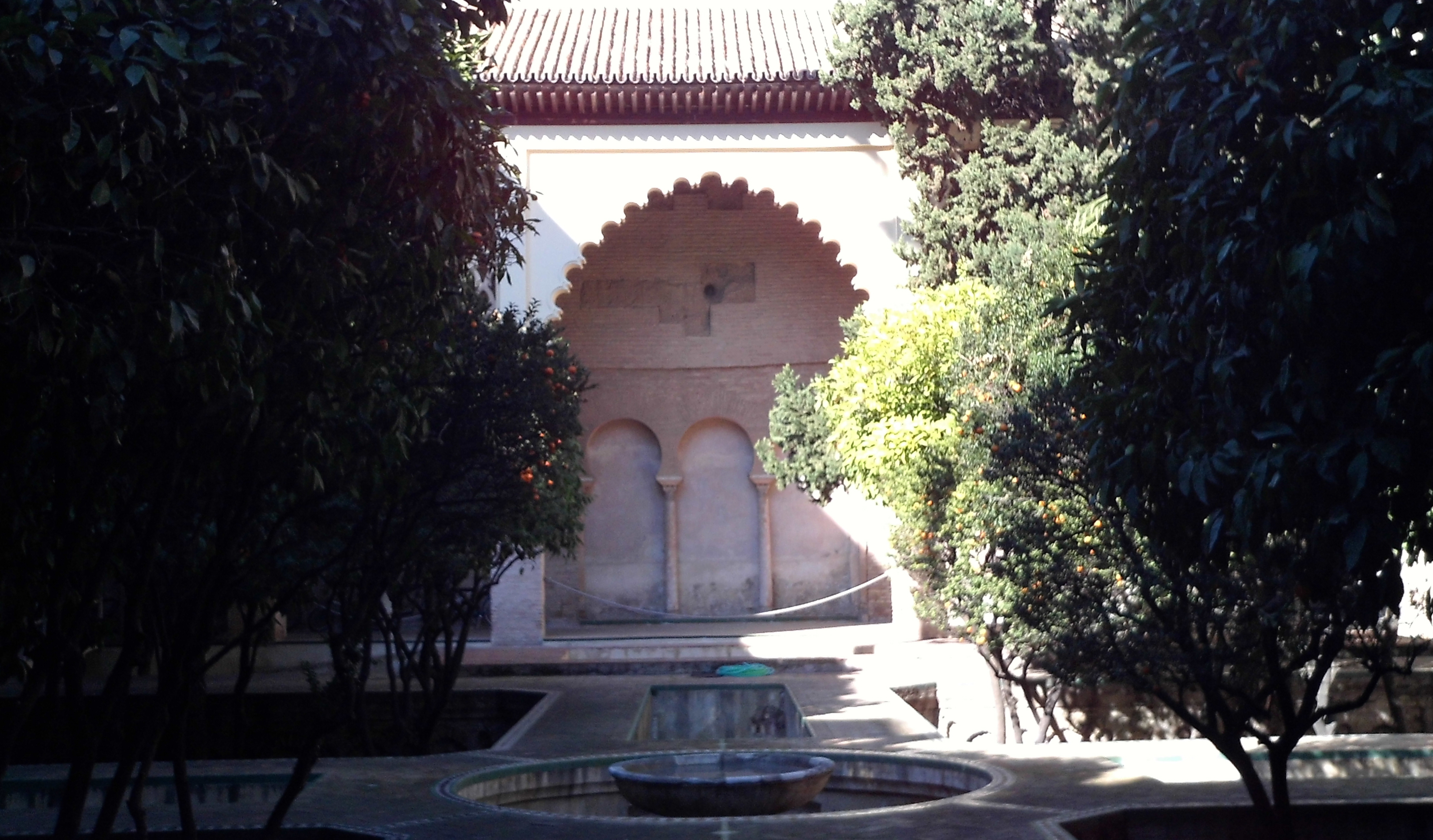 Patio de la Casa de la Contratación. Sevilla, Andalucía, España.